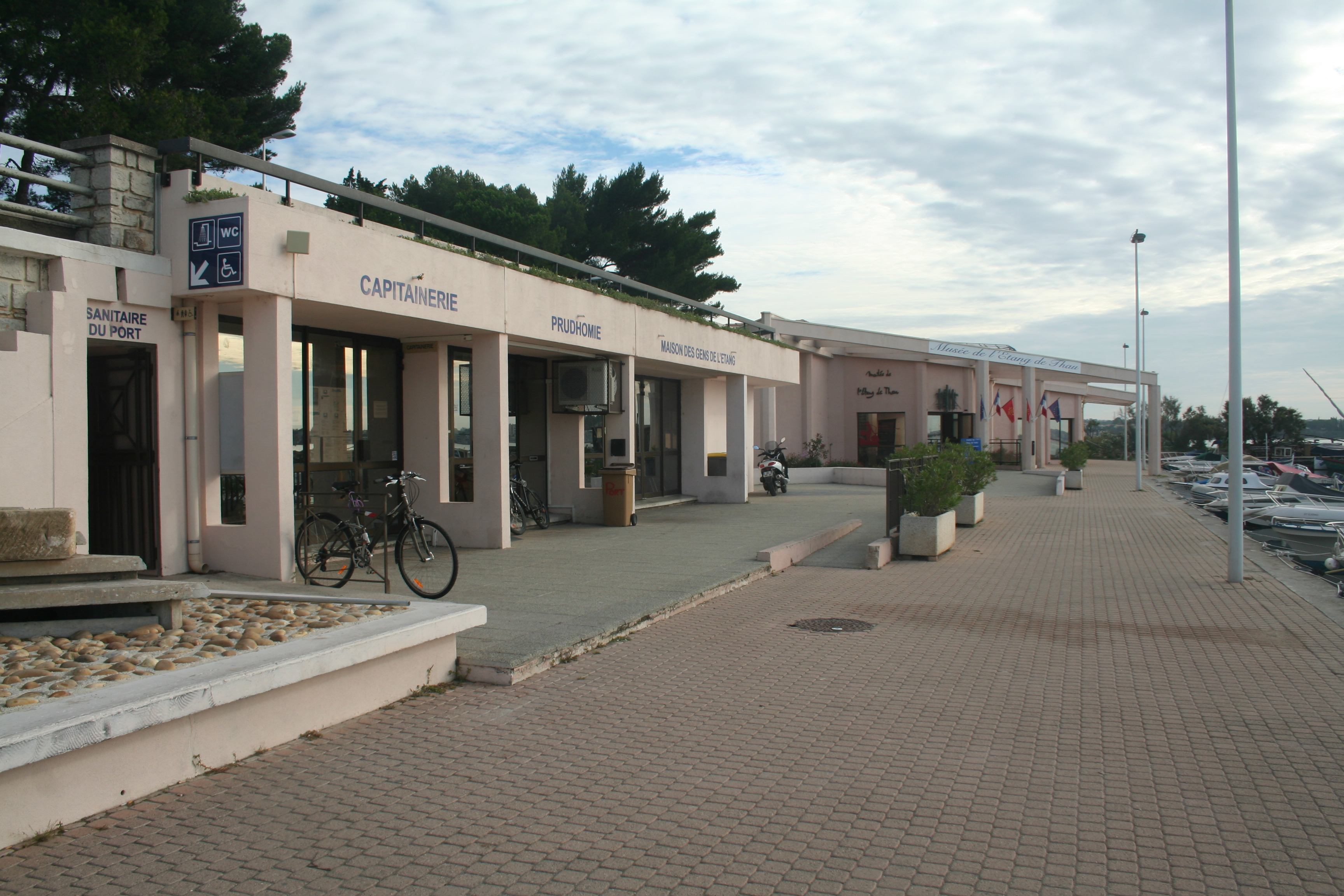 Bouzigues (Hérault) - capitainerie et musée de l'Étang de Thau.